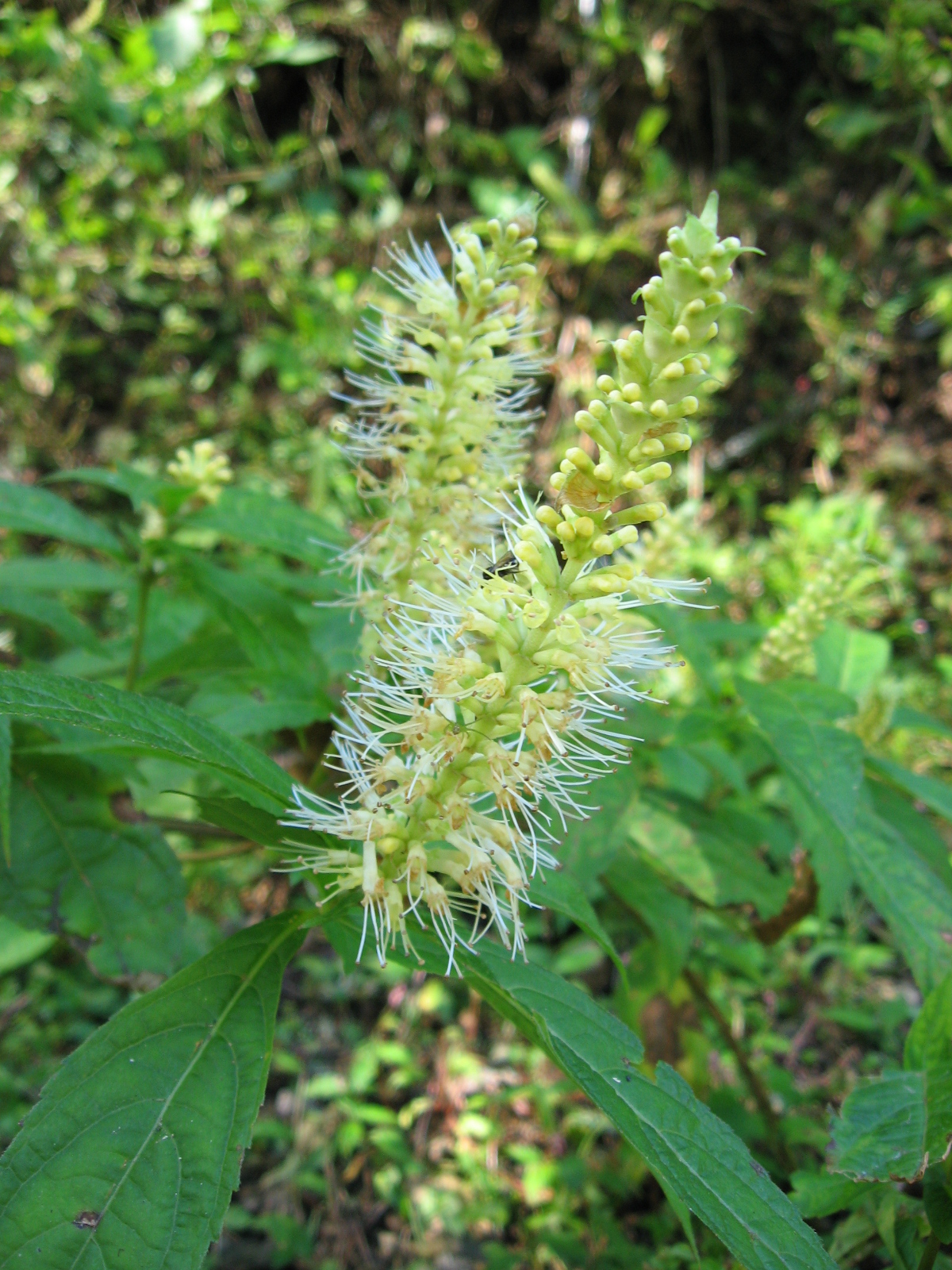 テンニンソウ (Leucosceptrum japonicum)